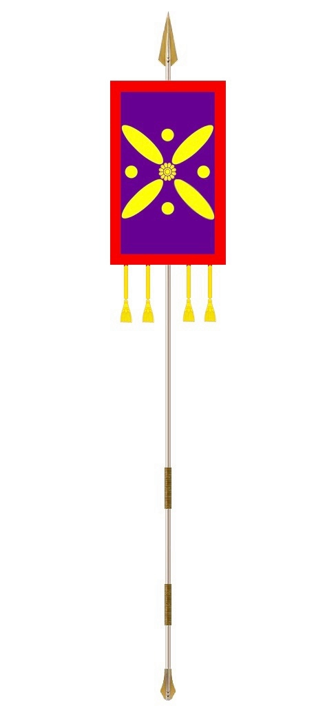 درفش کاویانی که با الهام از تصاویر موجود و طرح دیگر درفشهای باستانی طراحی شده.